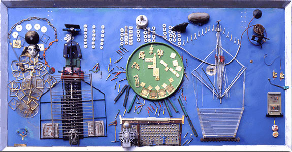 Der giftgrüne Teller auf blau, Metall-Collage aus Schrott und Metallteilen. Messingschild mit Gravur "Irma Hünerfauth Denke nicht,wundere dich."